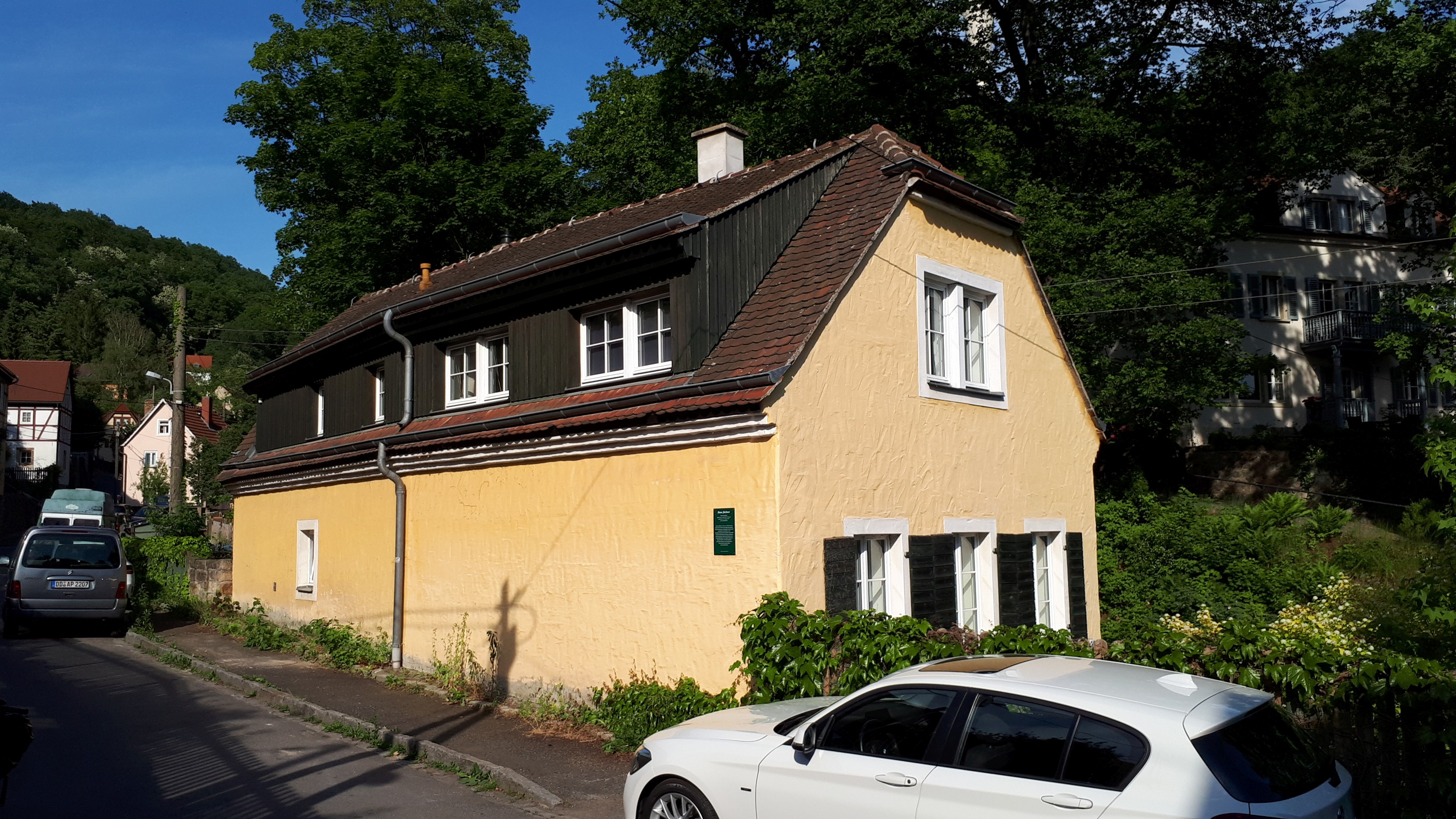 Talhaus, von 1921 bis 1977 Wohnhaus des Malers Hans Jüchser (Wachwitzgrund 56, 01326 Dresden)